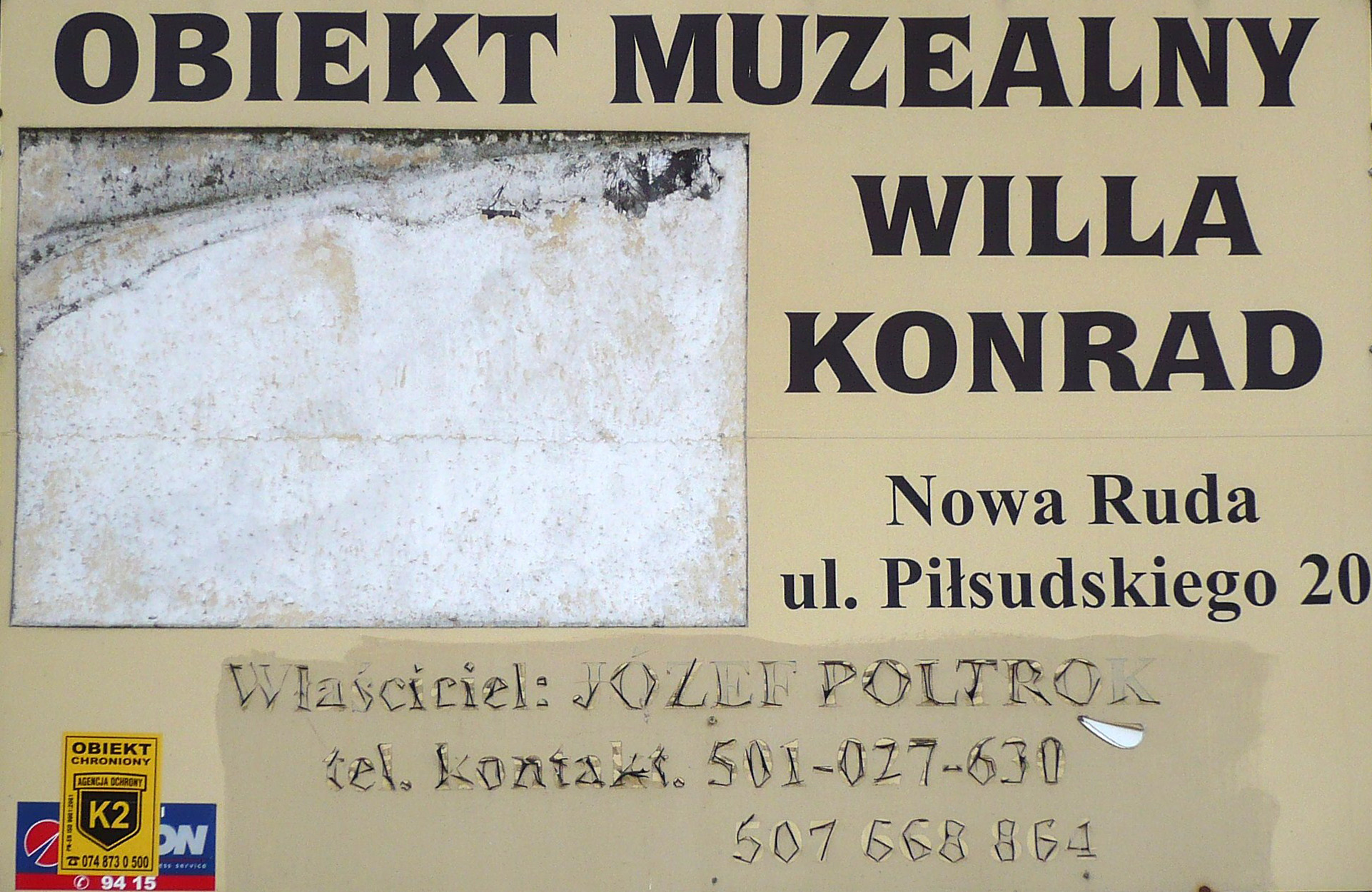 Tablica informacyjna o willi przy ul. Piłsudskiego 20 w Nowej Rudzie